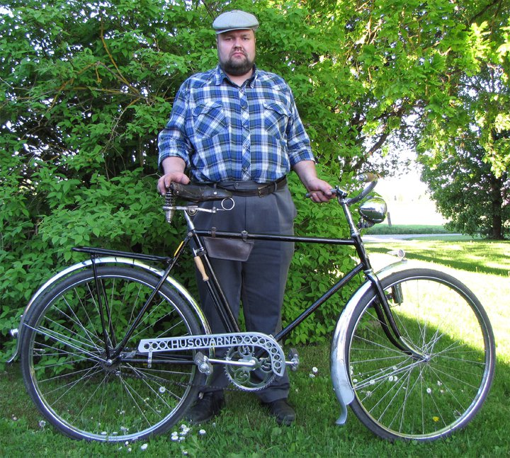 Jalgrattakollektsionäär Valdo Praust ühega Teise maailmasõja eel Eestis levinud Husqvarna jalgratastest, 2010.